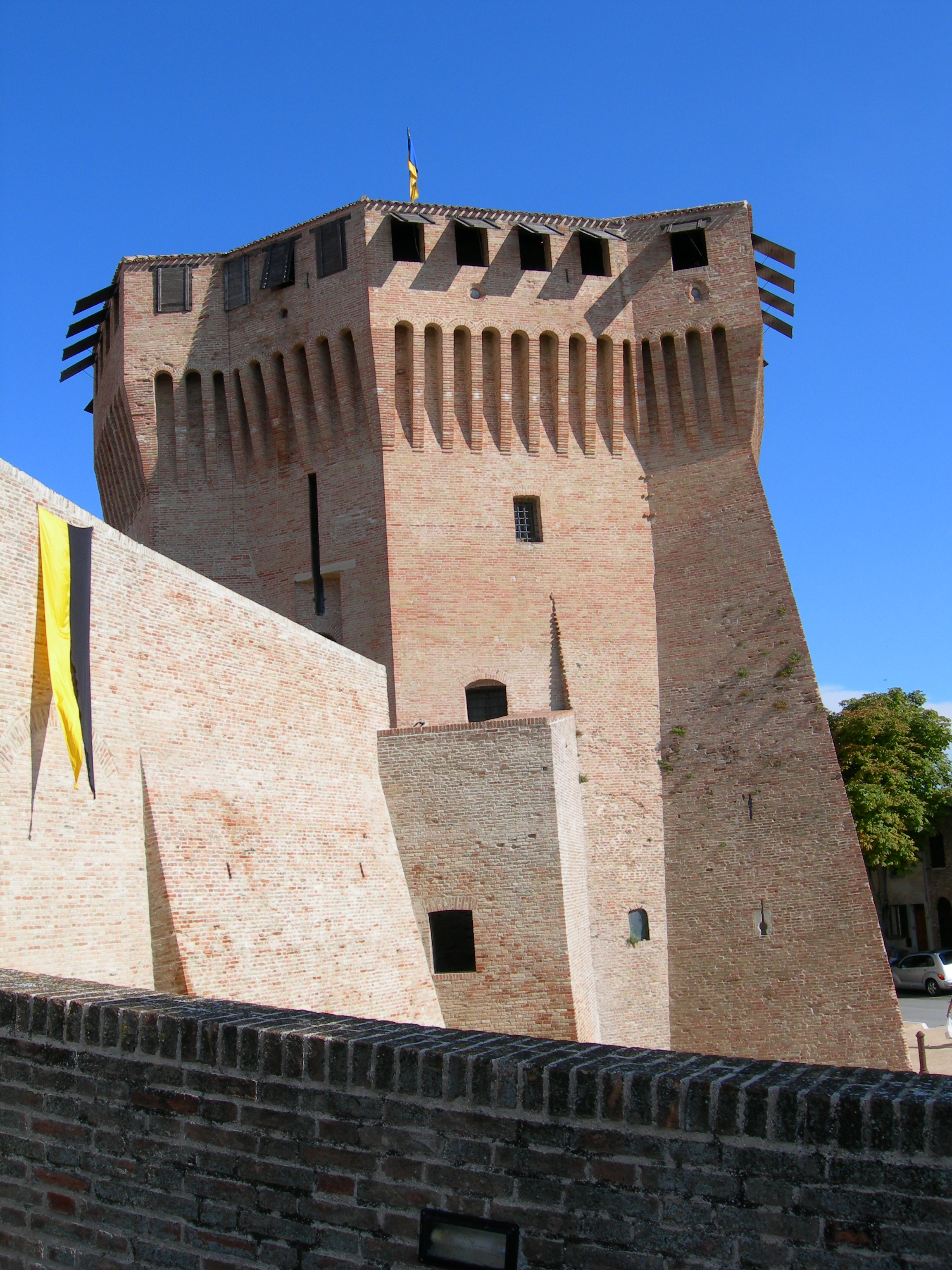 Mastio della Rocca Roveresca di Mondavio